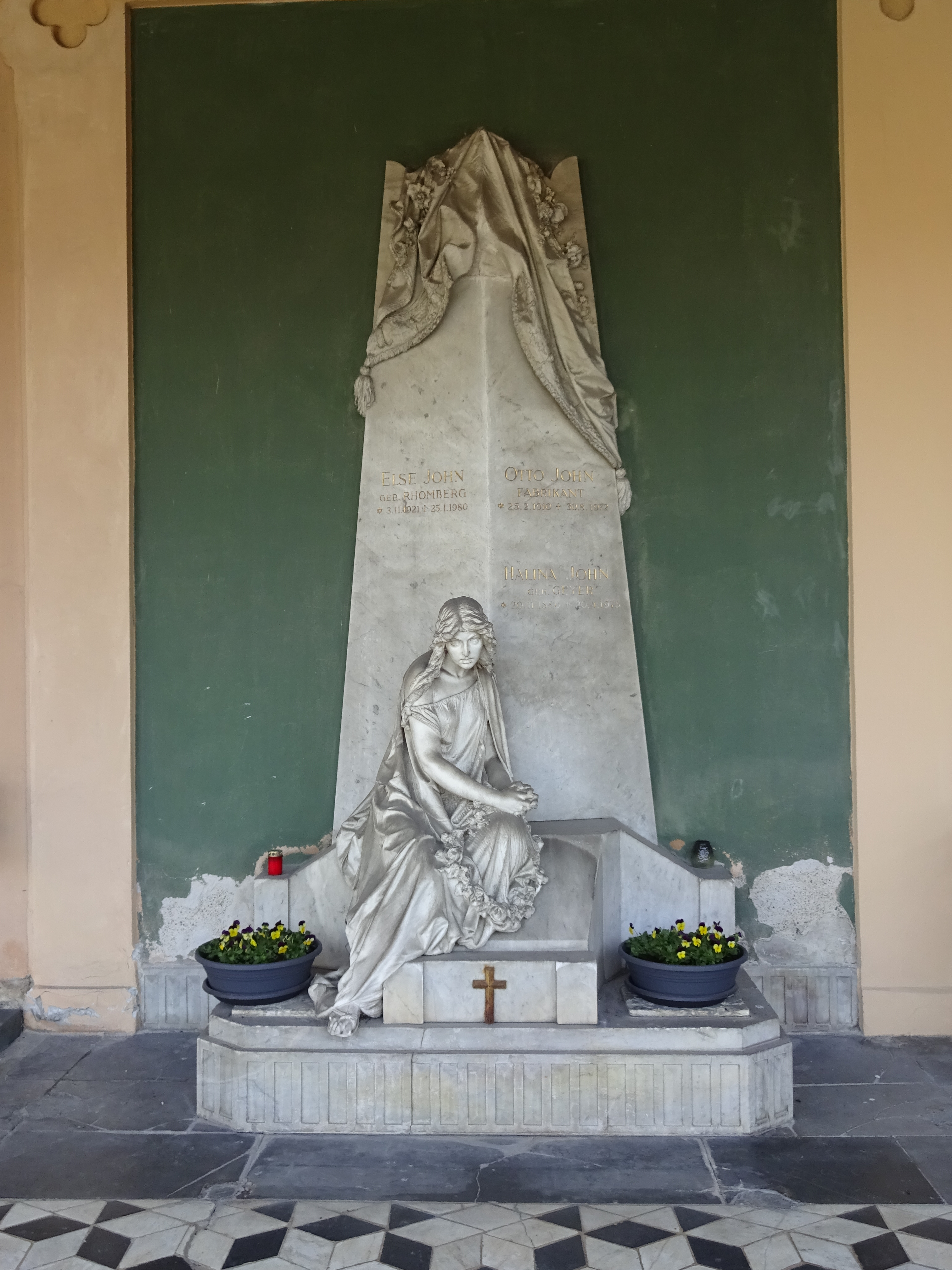 Westfriedhof Innsbruck, vormalige Grabstätte Lodron in den Ostarkaden des nördlichen Teils, Skulptur von Andrea Malfatti, 1879